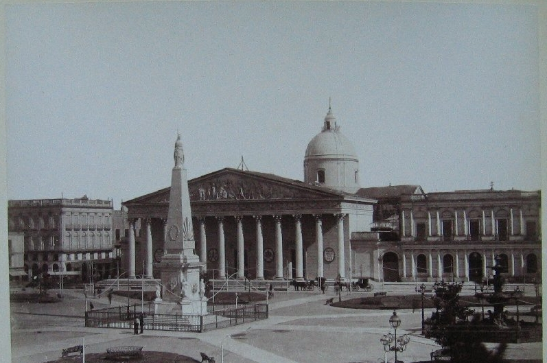 La Catedral ubicada en la Ciudad de Buenos Aires